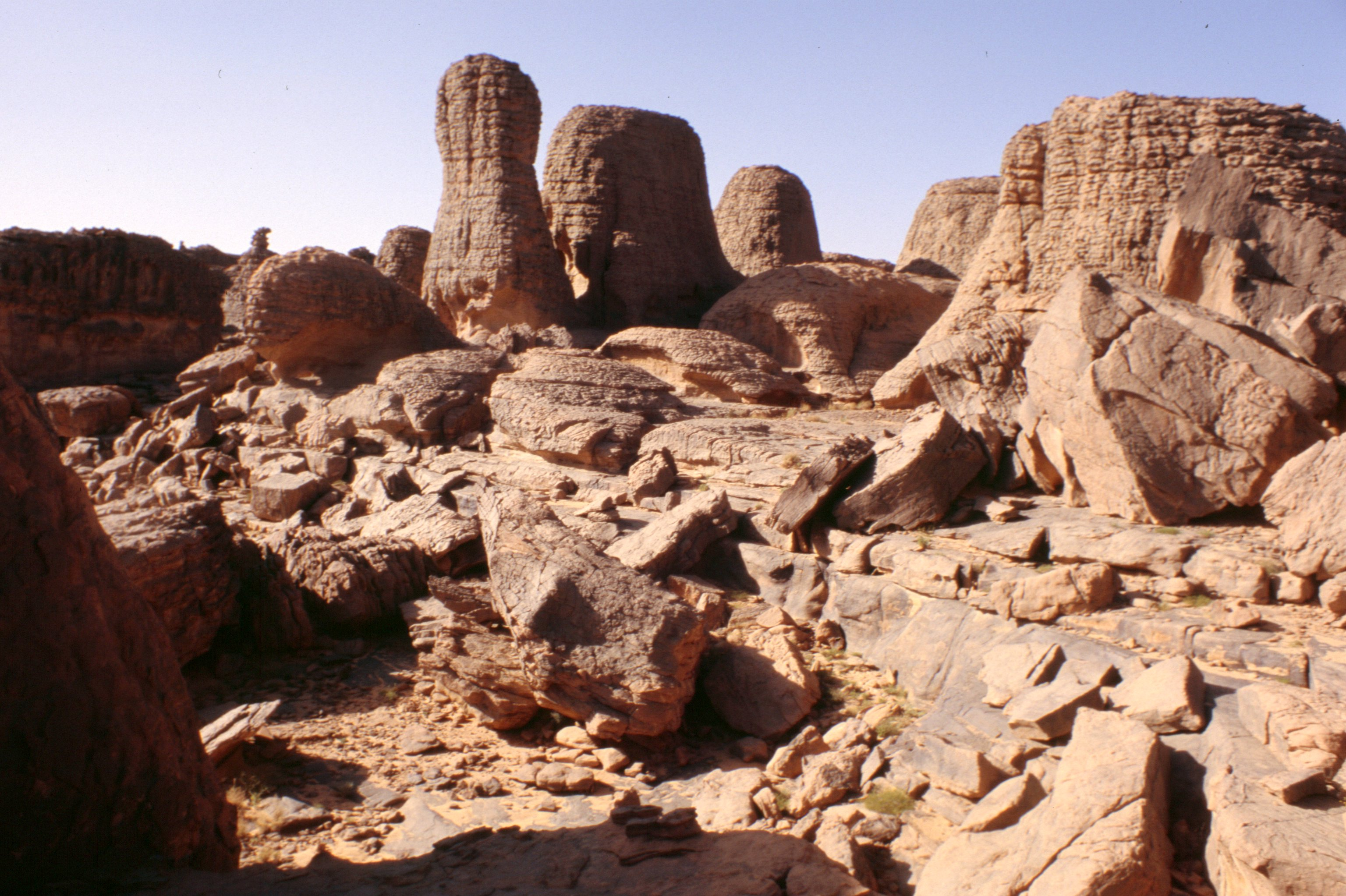 Tassili n'Ajjer, Algeria